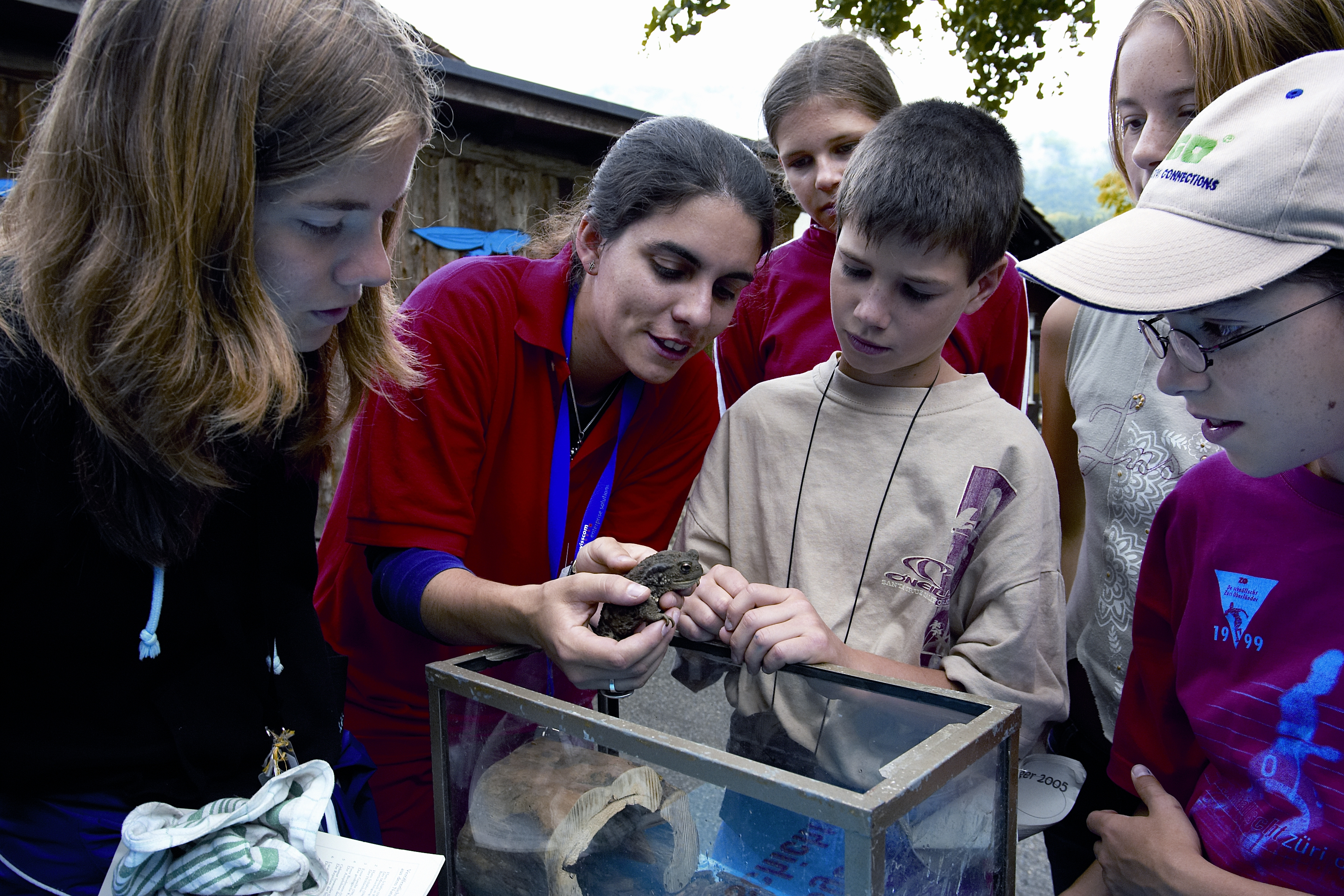 Schüler im Tierpark Goldau